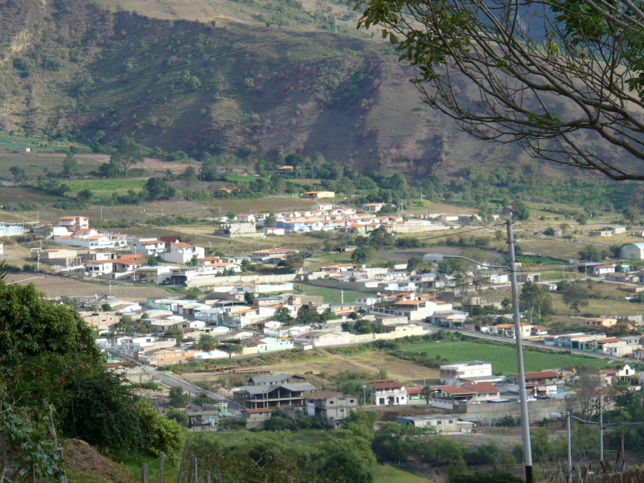 Bailadores.